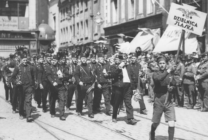 Zlot członków Towarzystwa Gimnastycznego "Sokół", z trzech dzielnic, z okazji 50-lecia istnienia Towarzystwa w Wielkopolsce.